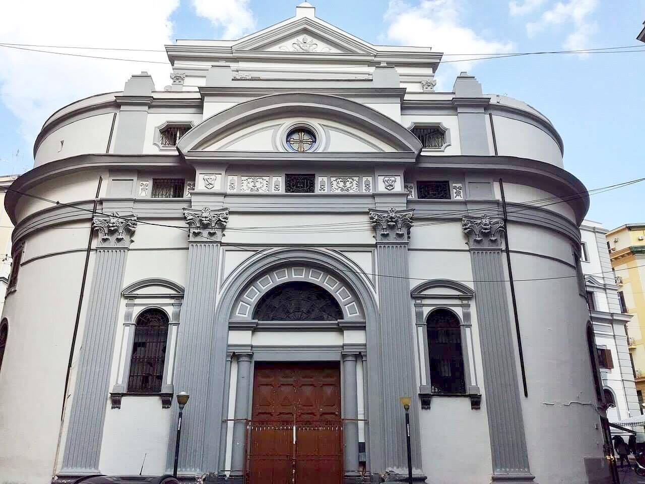 Facciata, basilica di San Pietro ad Aram (Napoli)